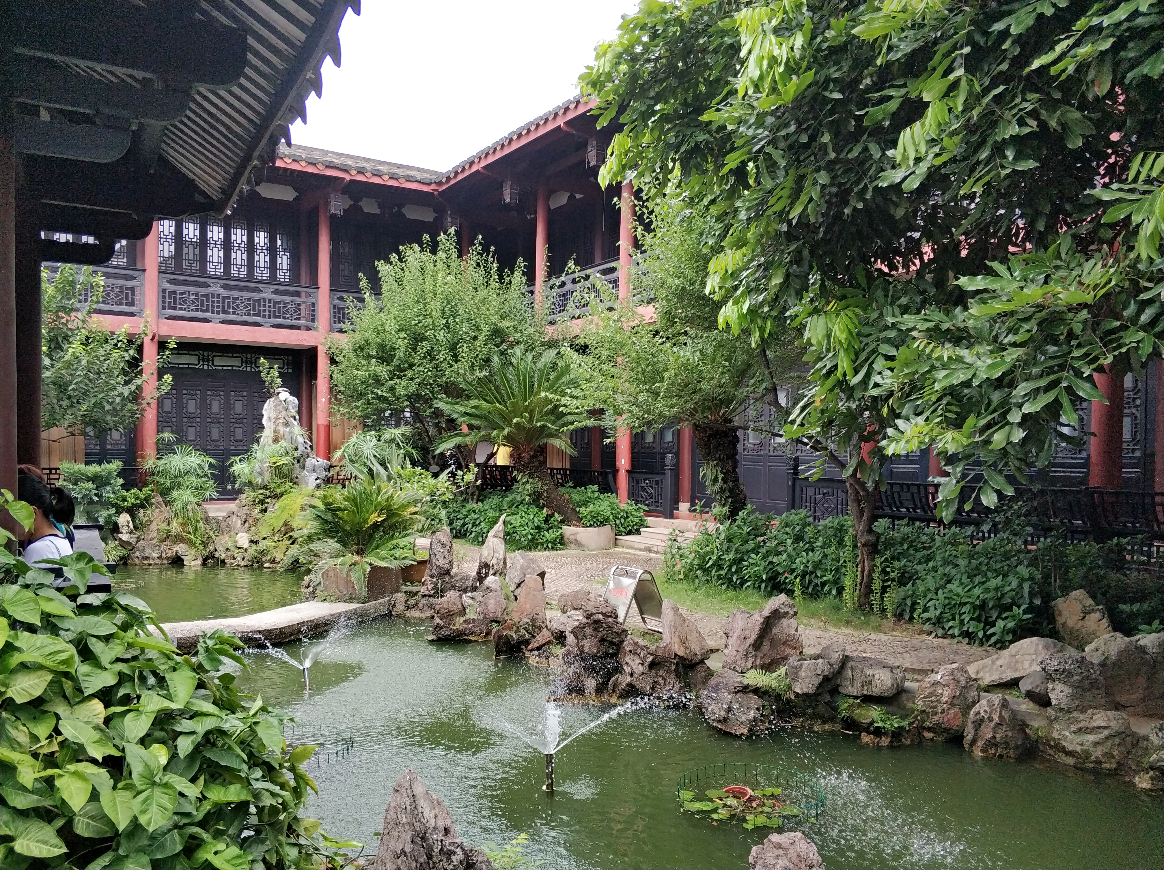 中文（中国大陆）: 福州市澳门路16号 林则徐祠堂 林文忠公祠 林则徐纪念馆